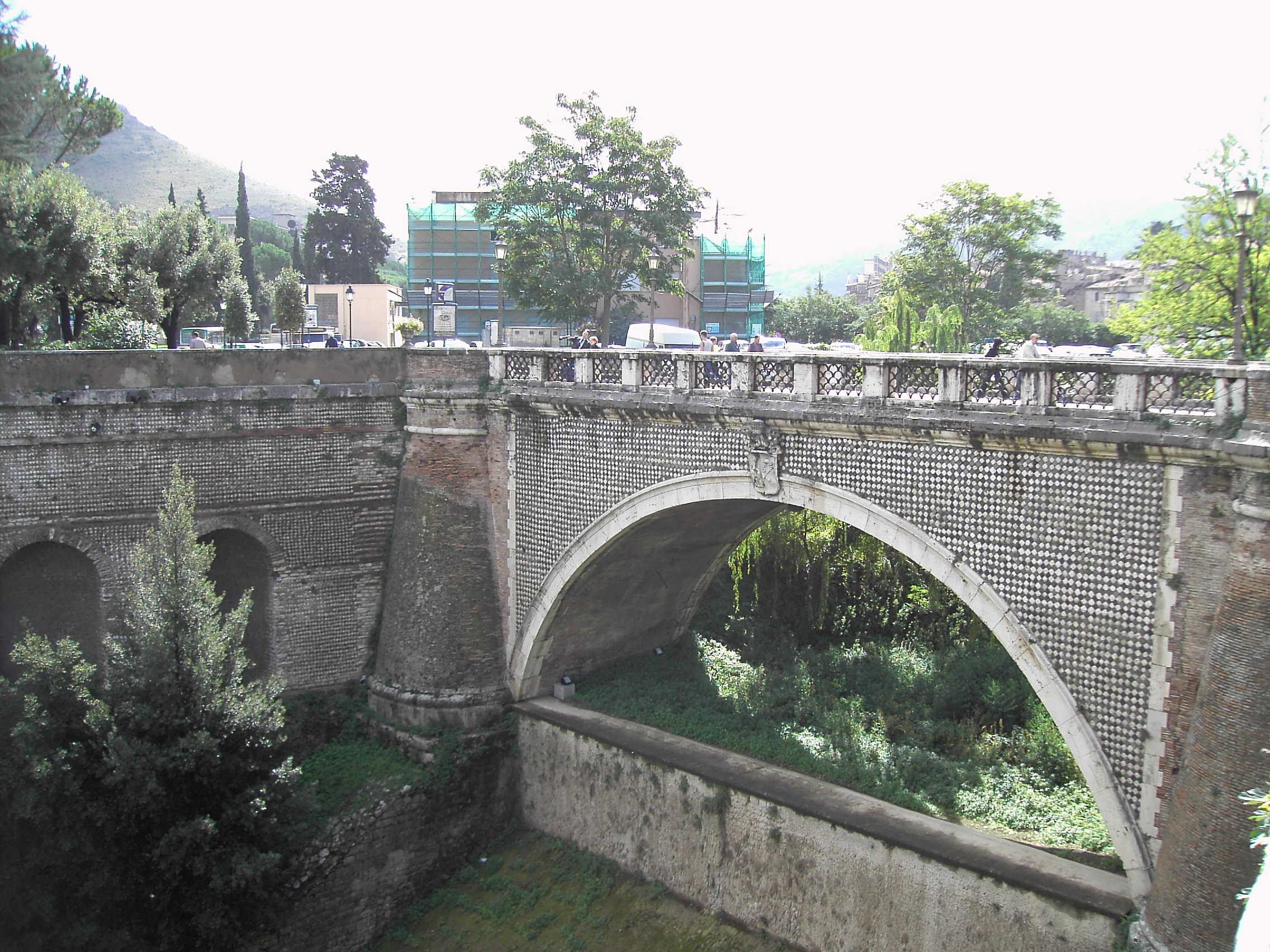 Tivoli, Ponte Gregoriano By Lalupa